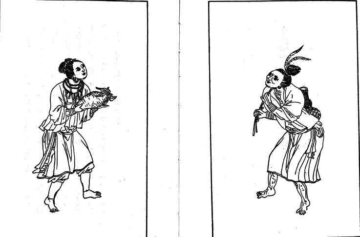 Makatao in 1700s